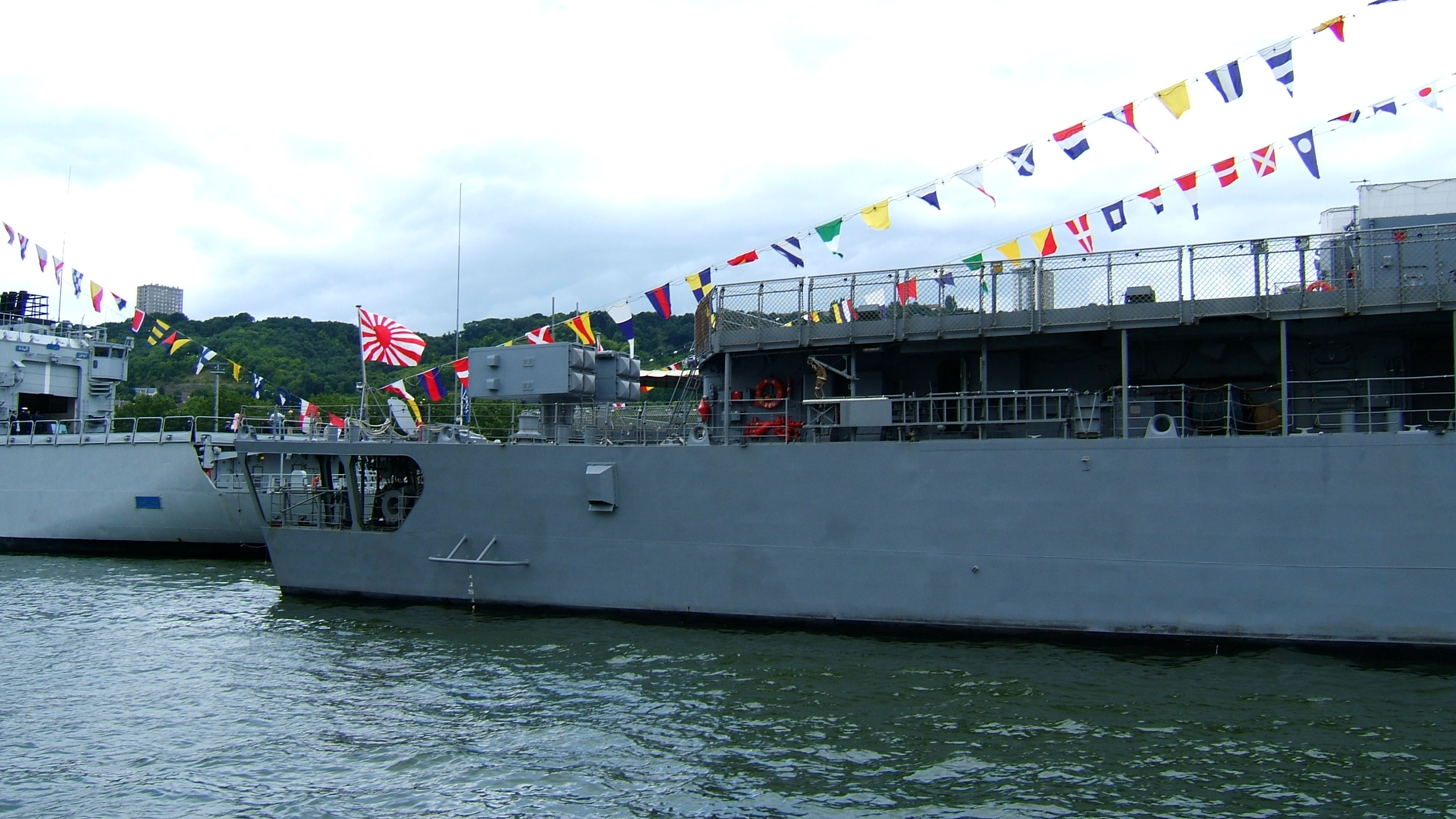 Le drapeau de la Marine Japonaise sur la poupe du navire-école Kashima (3e du nom) des forces maritimes d'autodéfense au second plan. Il déplace 4 050 tonnes et fait 143 m de long. Mis en service en 1995, il est doté dâ€™un équipage de 370 personnes et son port d'attache à Kure, au sud de Hiroshima.